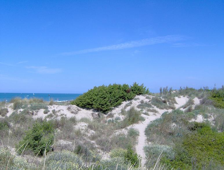 Dune di Tirrenia, Pisa